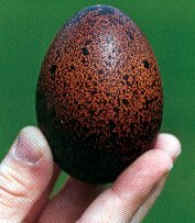 Oeuf de Marans